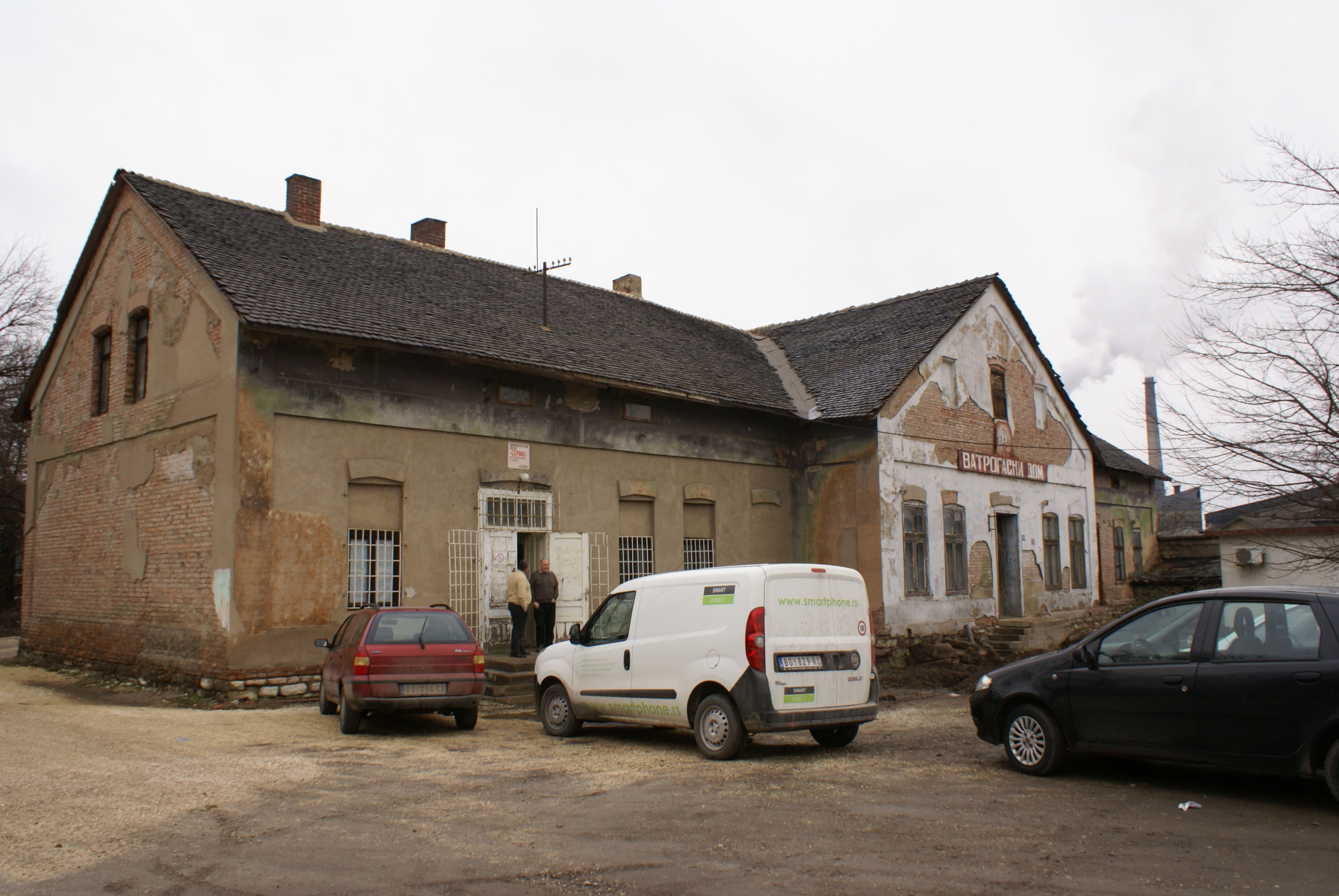 Српски (ћирилица): Весели рудар поглед са стране